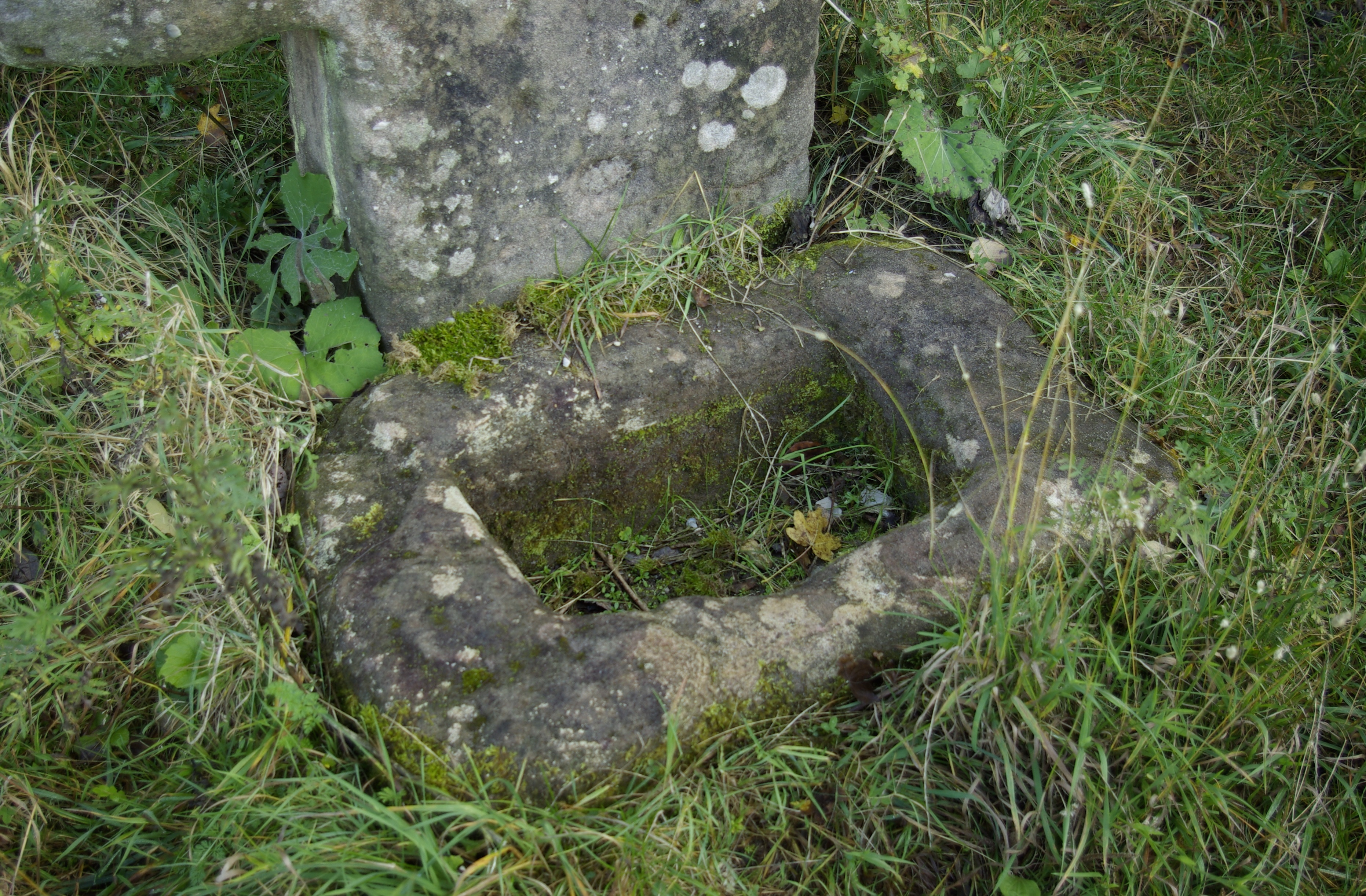 Das Weiße Kreuz, auch Hirschlecke genannt, im Tennenloher Forst im Landkreis Erlangen-Höchstadt. Nicht zu verwechseln mit der weiter nördlich befindlichen Hirschlecke im Buckenhofer Forst.